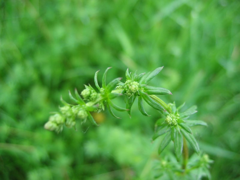 junges Weißes Labkraut Galium album